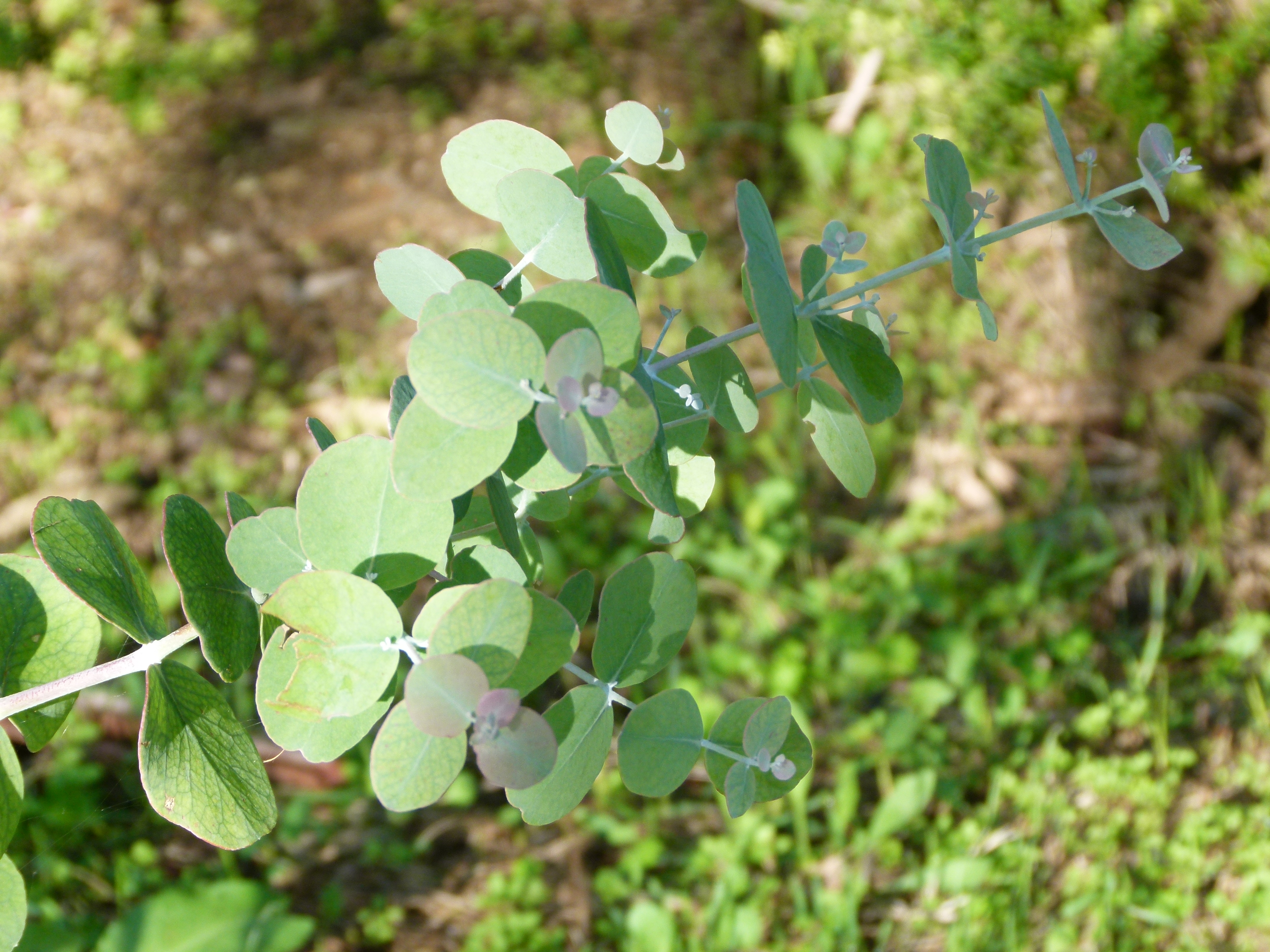 Jardin botanique Barcelone